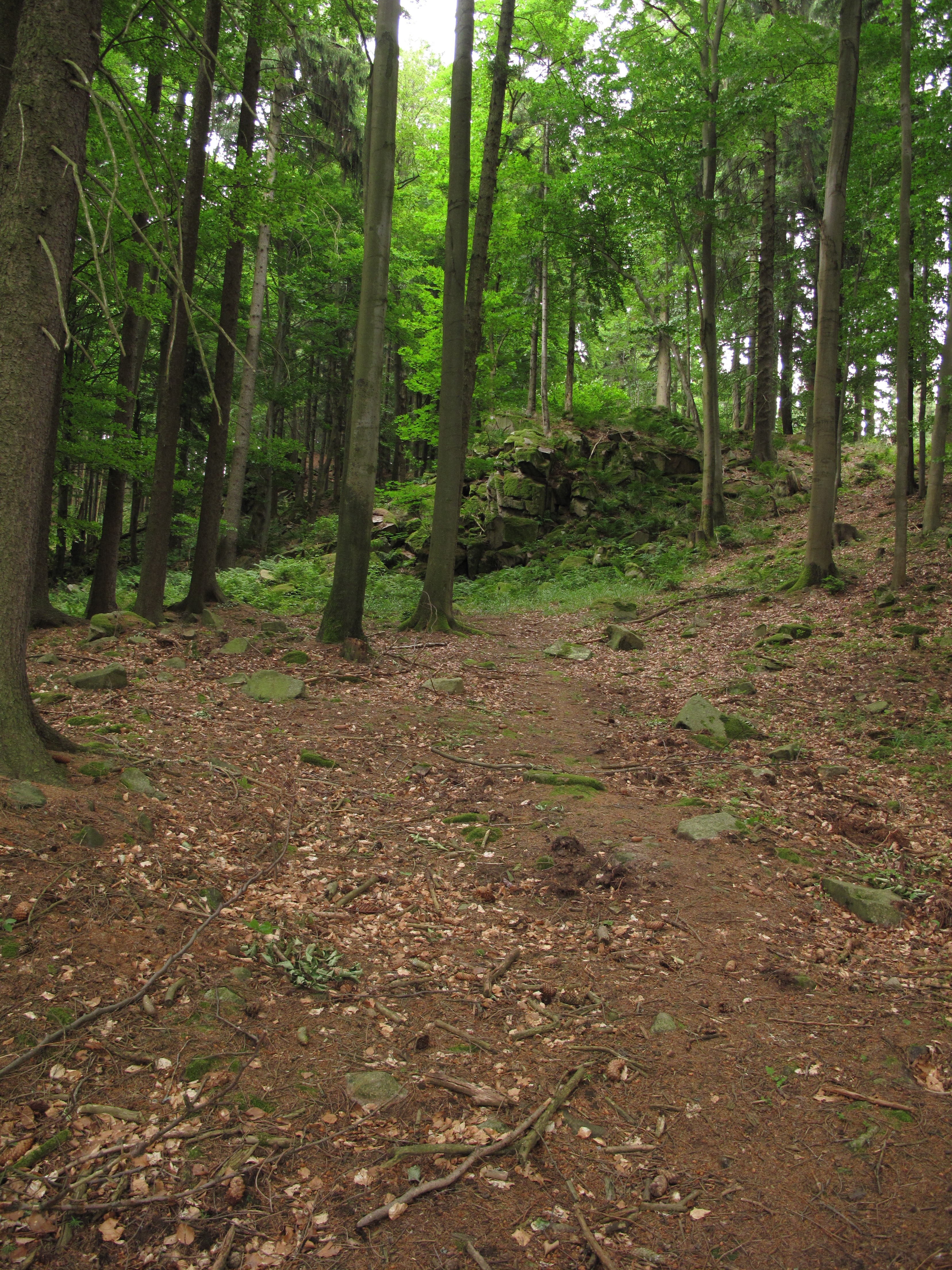 Přírodní památka Přední skála. Okres Jihlava, Česká republika.